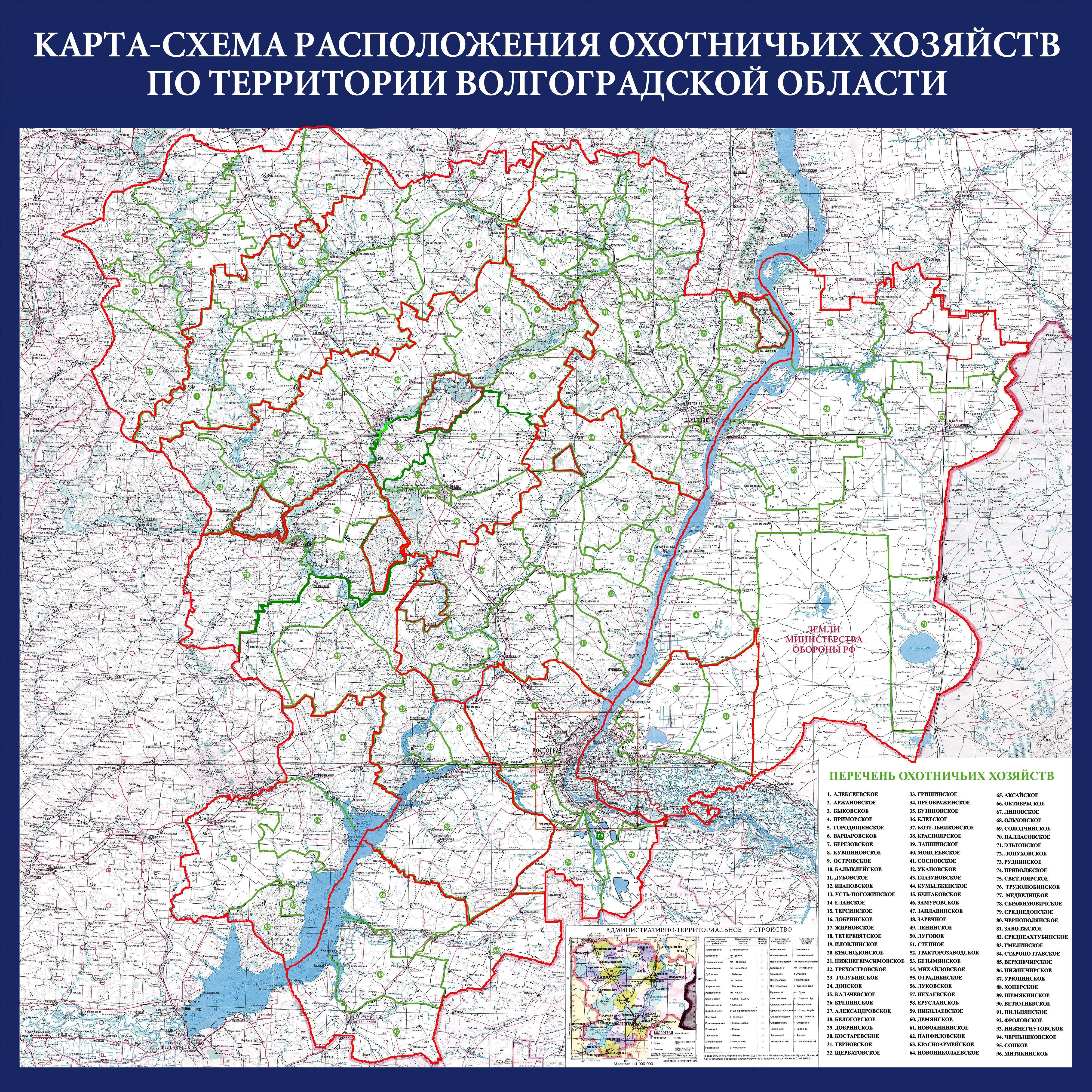 Карта охотничьих хозяйств Волгоградской области